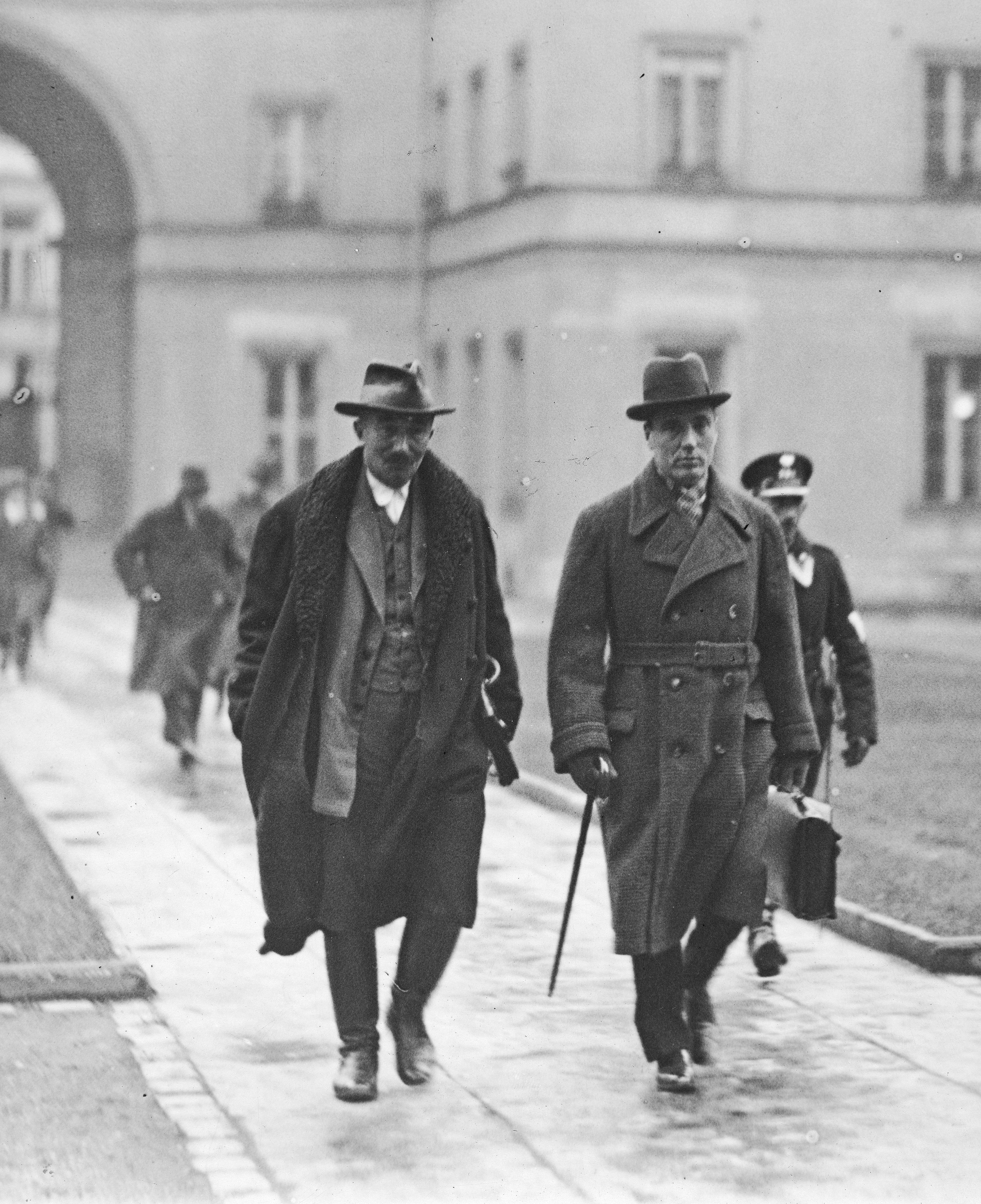 Proces brzeski w Sądzie Okręgowym mieszczącym się w pałacu Paca przy ulicy Miodowej 15 w Warszawie. Oskarżony Wincenty Witos (z lewej) w towarzystwie swojego obrońcy Stanisława Szurleja przybywa na rozprawę.